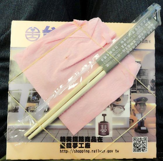 中文（中国大陆）: 台铁便当外包装